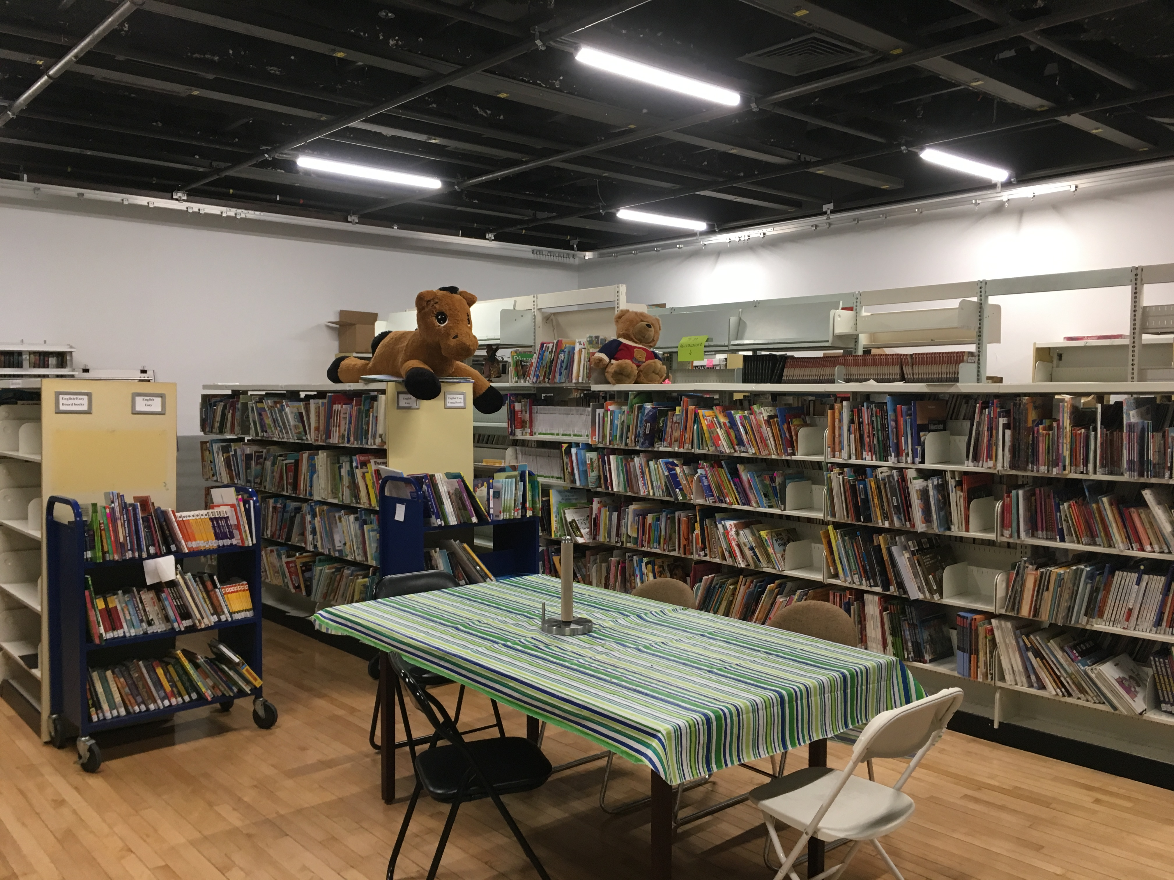 Au sein de ce local, œuvrent également les bénévoles pour s'assurer de la bonne circulation des documents.